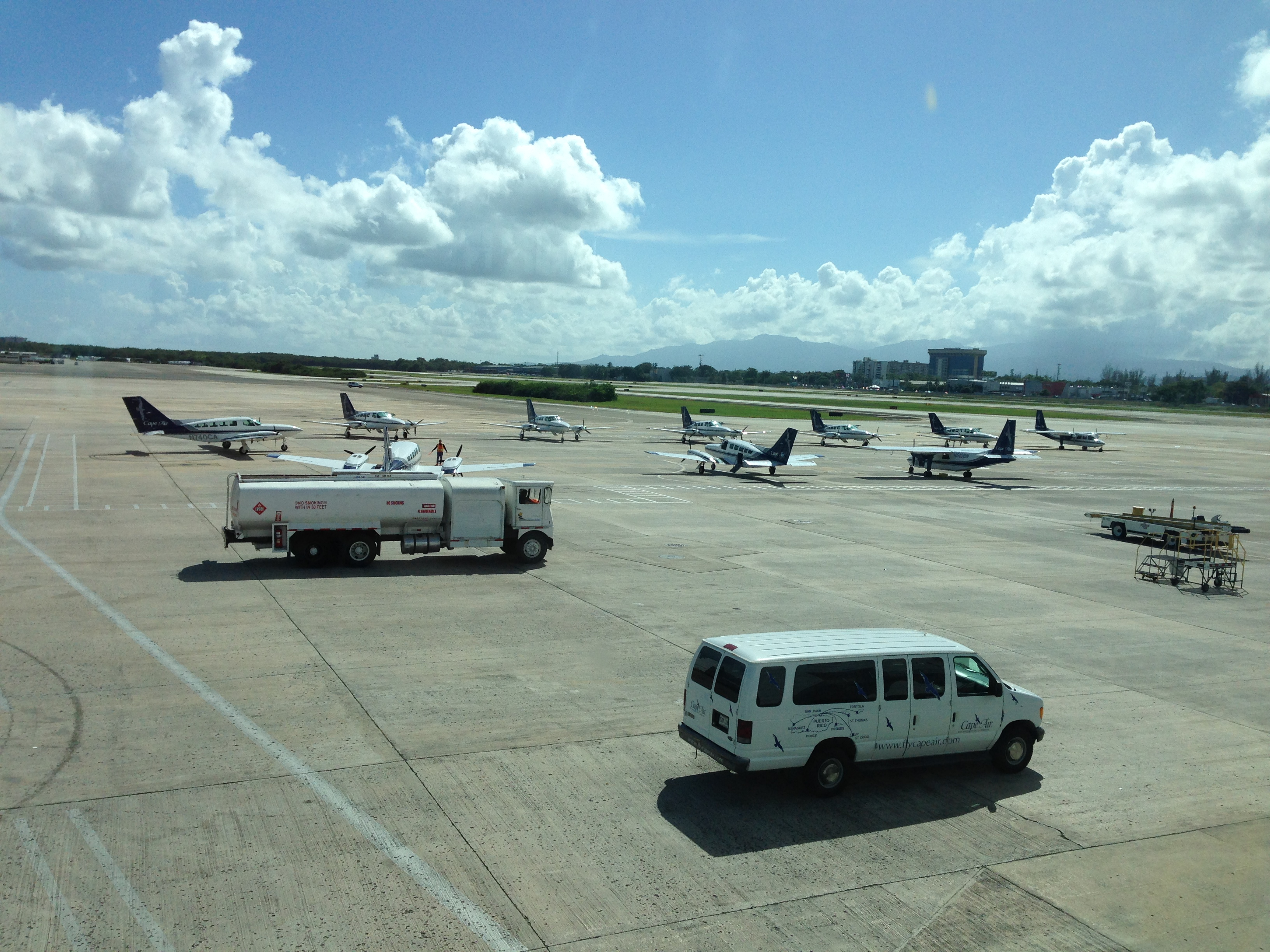 Cangrejo Arriba, Carolina, Puerto Rico